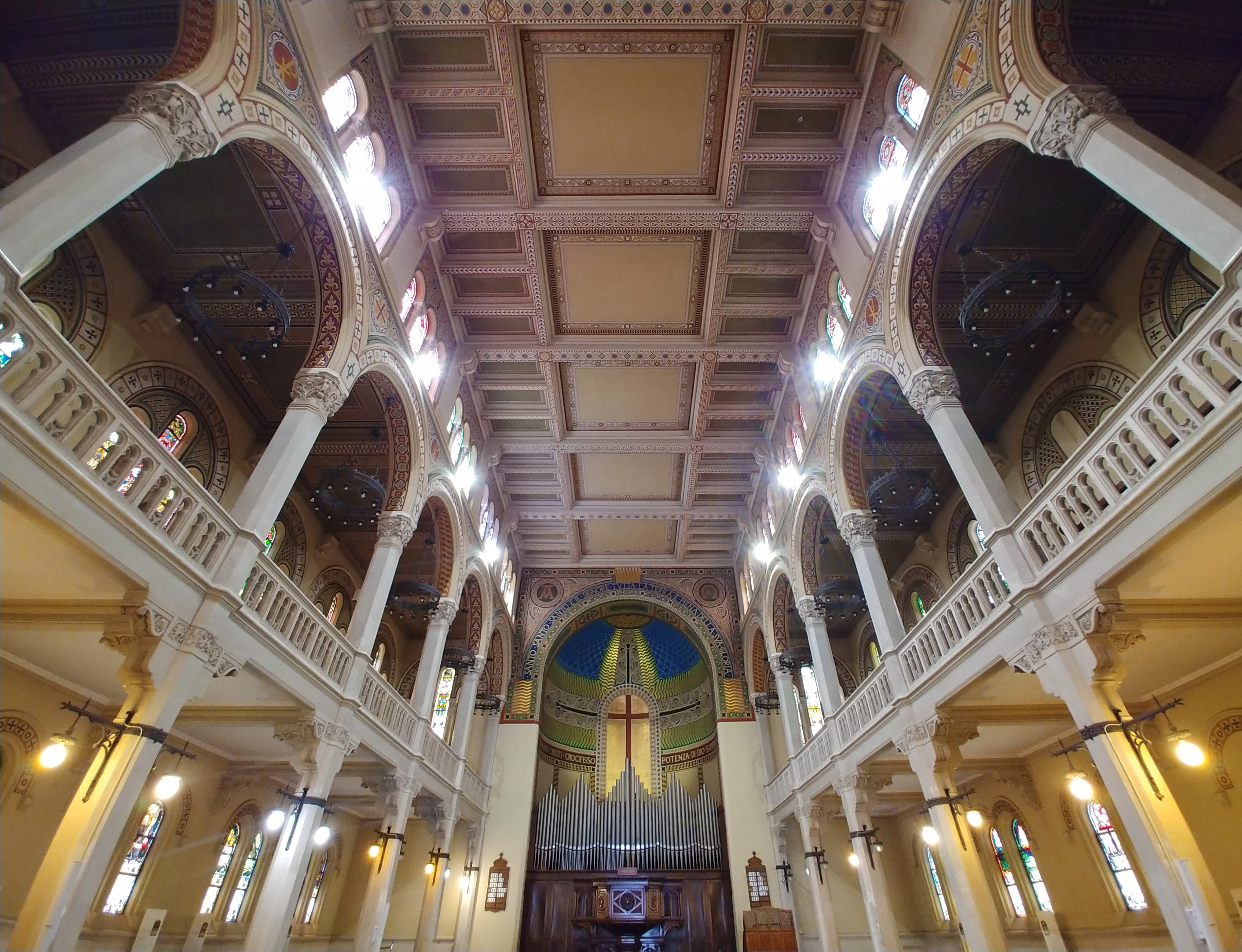 Interno.